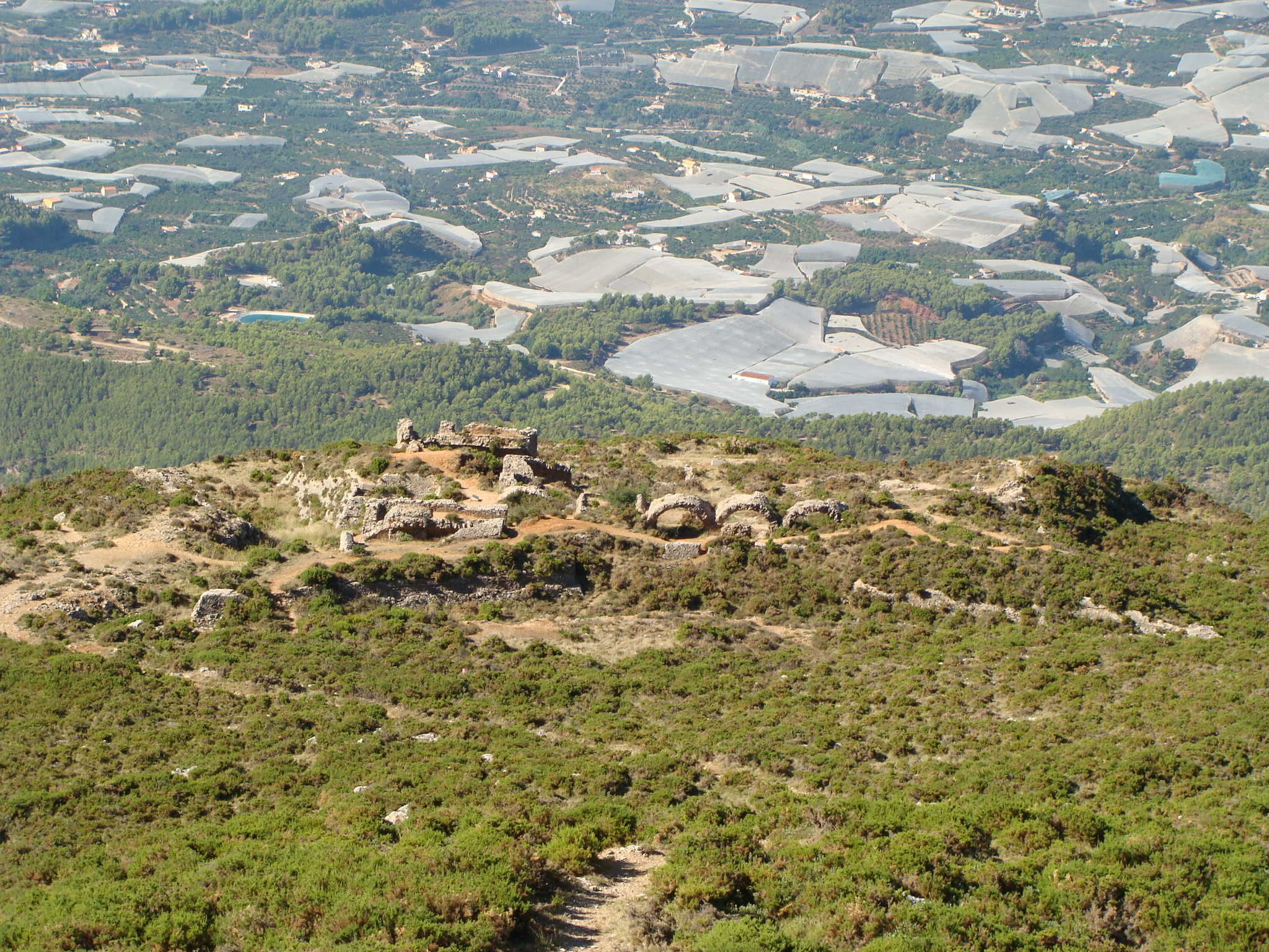 Vista del fuerte de Felipe II situado en la Sierra de Bernia.